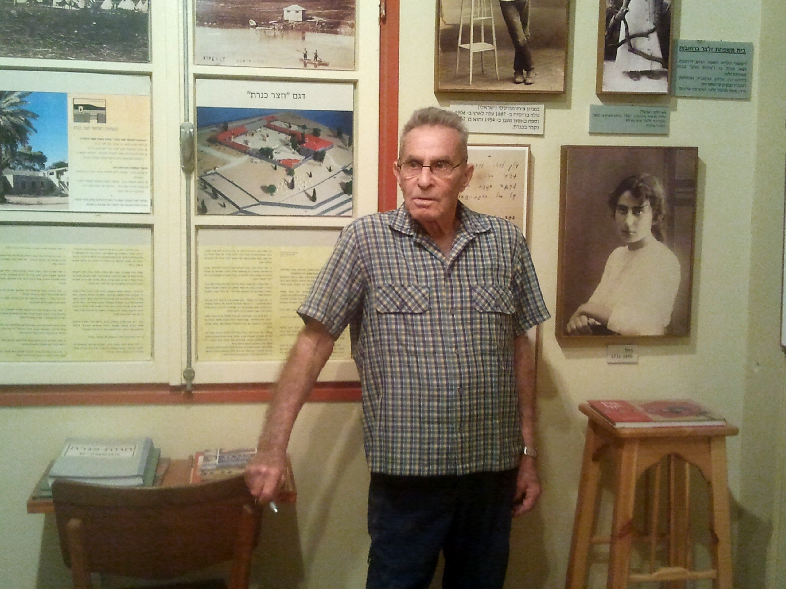 .מוזיאון לתולדות כנרת. הבית נבנה בשנת 1929 ונקרא הבית האמצעי בראש הגבעה לאחר שיפוץ נפתח בשנת 1989 מחדש ומשמש כמוזיאון קבוצת כנרת והארכיון שלה ארוני ישראלי בנו של בן ציון ישראלי יוזם ומיסד המוזיאון בחדר 2 המוקדש לימי חצר כנרת בתקופה הראשונה